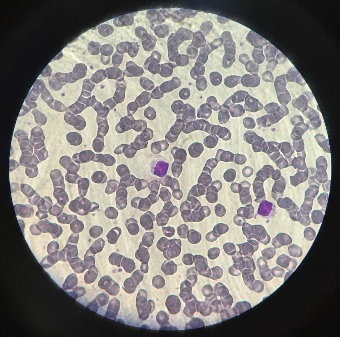 Linfocitos T entre eritrocitos visualizado en microscopio óptico en una extensión sanguinea, con tinción de Giemsa